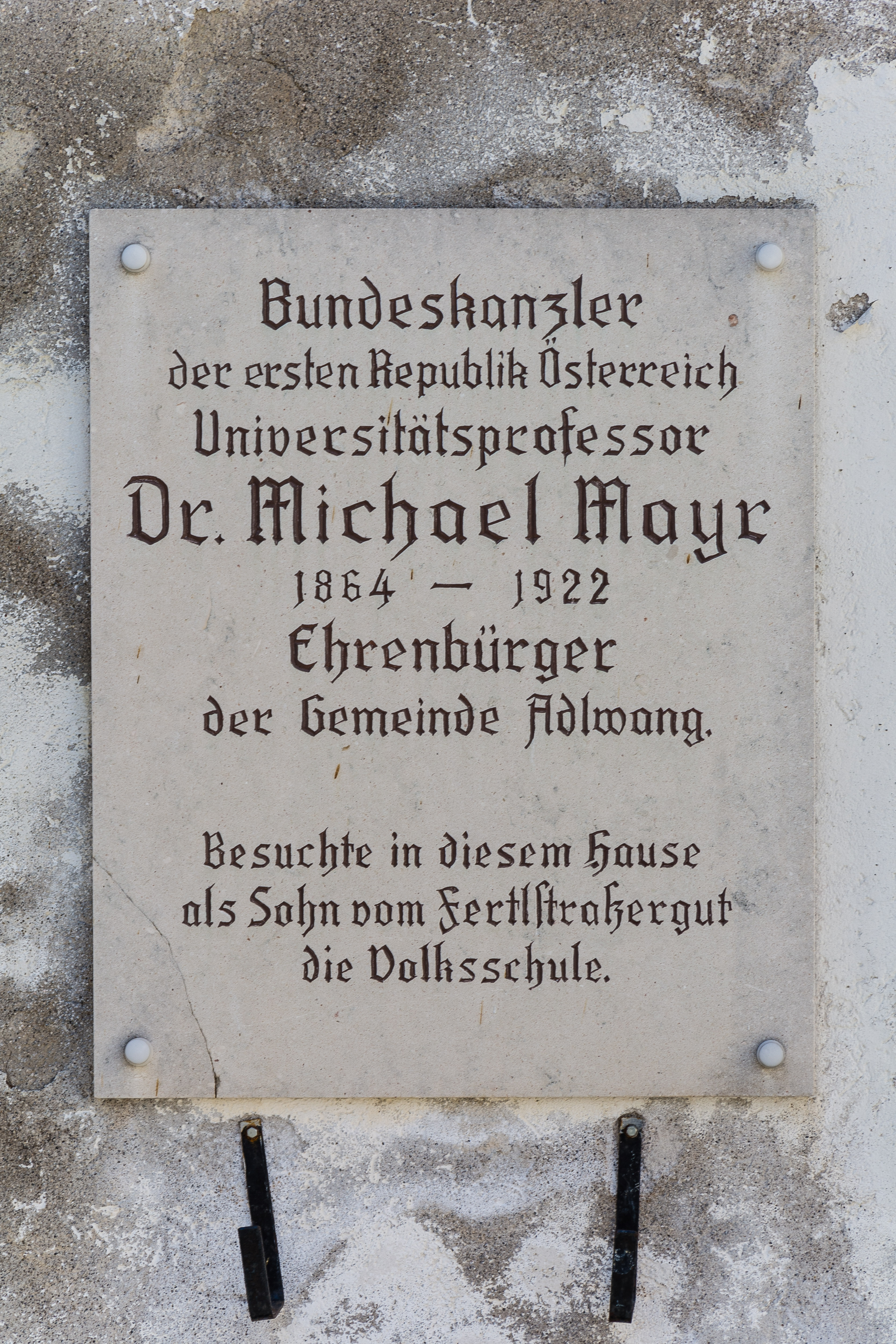 Am Pfarrheim von Adlwang ist eine Gedenktafel für Michael Mayr angebracht. Mayr war vom 7. Juli 1920 bis 1. Juni 1921 Bundeskanzler von Österreich.